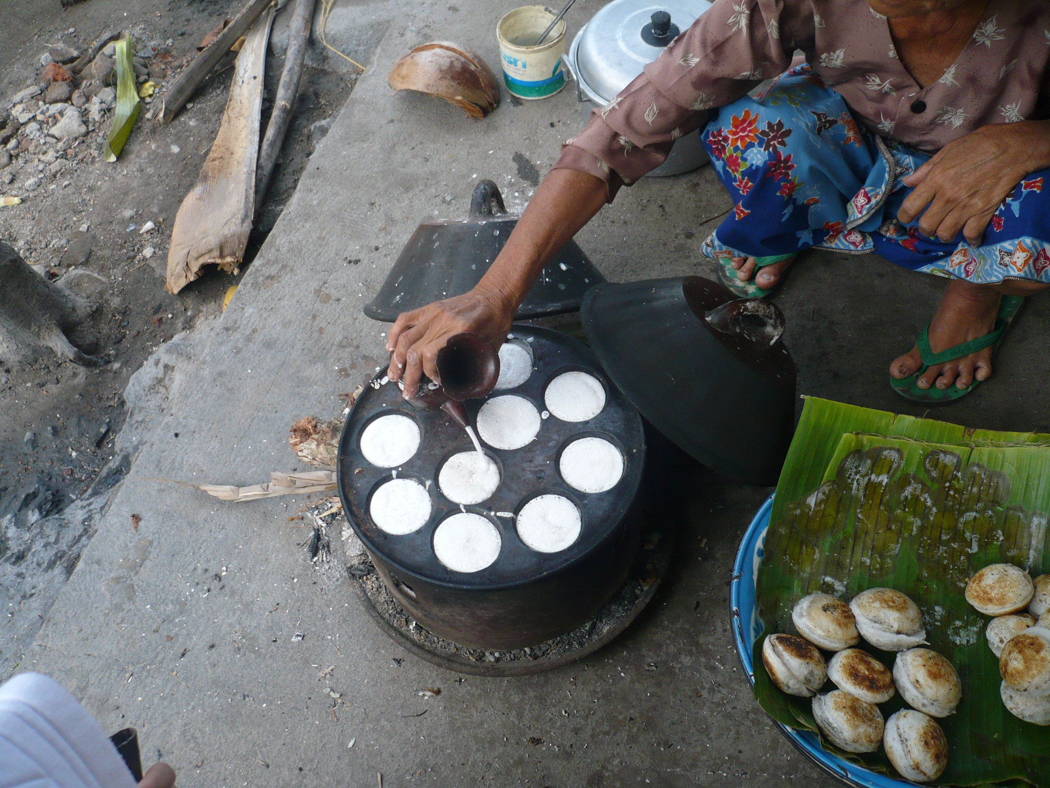 Adding santan (coconut milk)